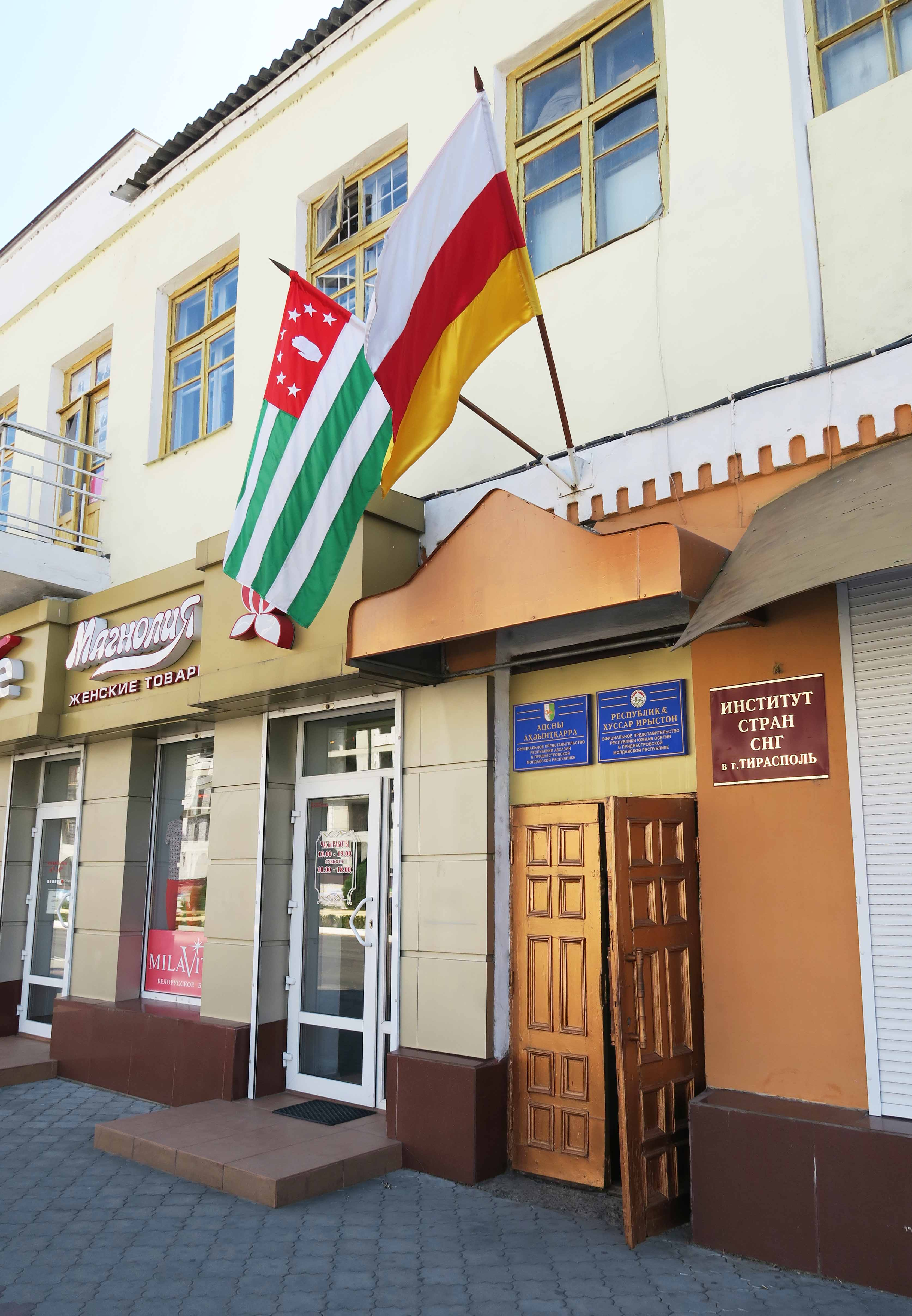 Tiraspol, Transnistria